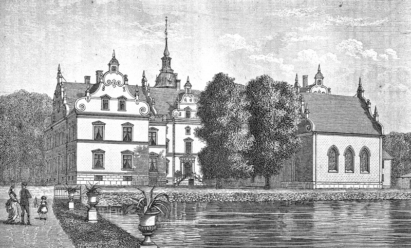 Ravnholt er en gammel hovedgård, som nævnes første gang i 1382. Gården ligger i Herrested Sogn, Vindinge Herred, Ørbæk Kommune. Hovedbygningen er opført i 1592-1620